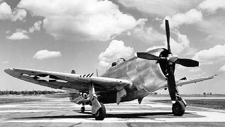 Republic P-47D-25